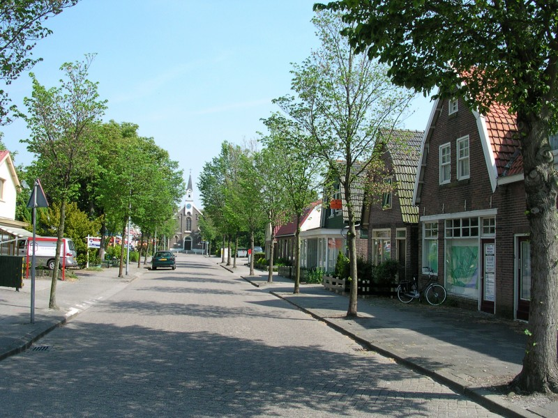 De kerk en het oude centrum van het dorp Anna Paulowna. Church and the old center of the village Anna Paulowna.